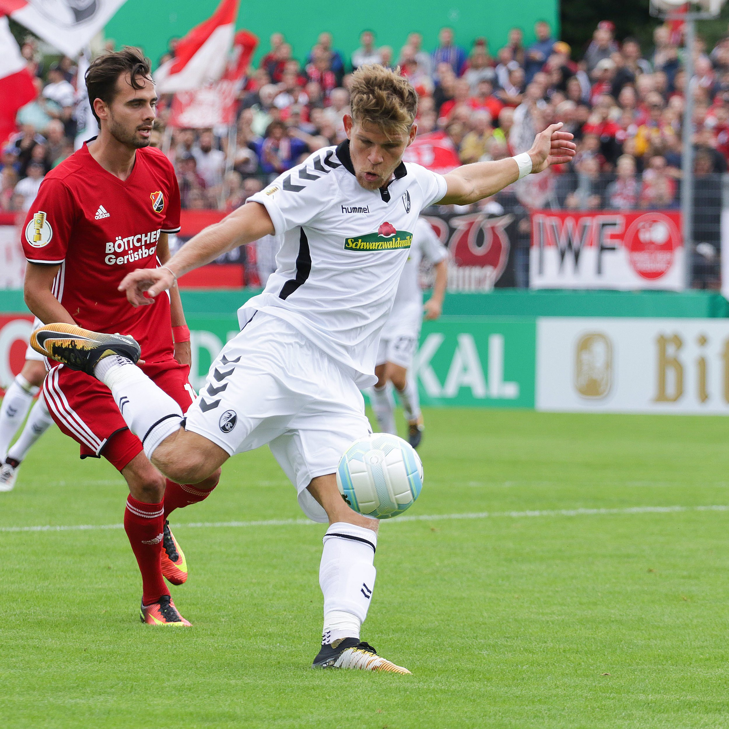 Florian Niederlechner beim DFB-Pokalspiel VfB Germania Halberstadt vs. SC Freiburg